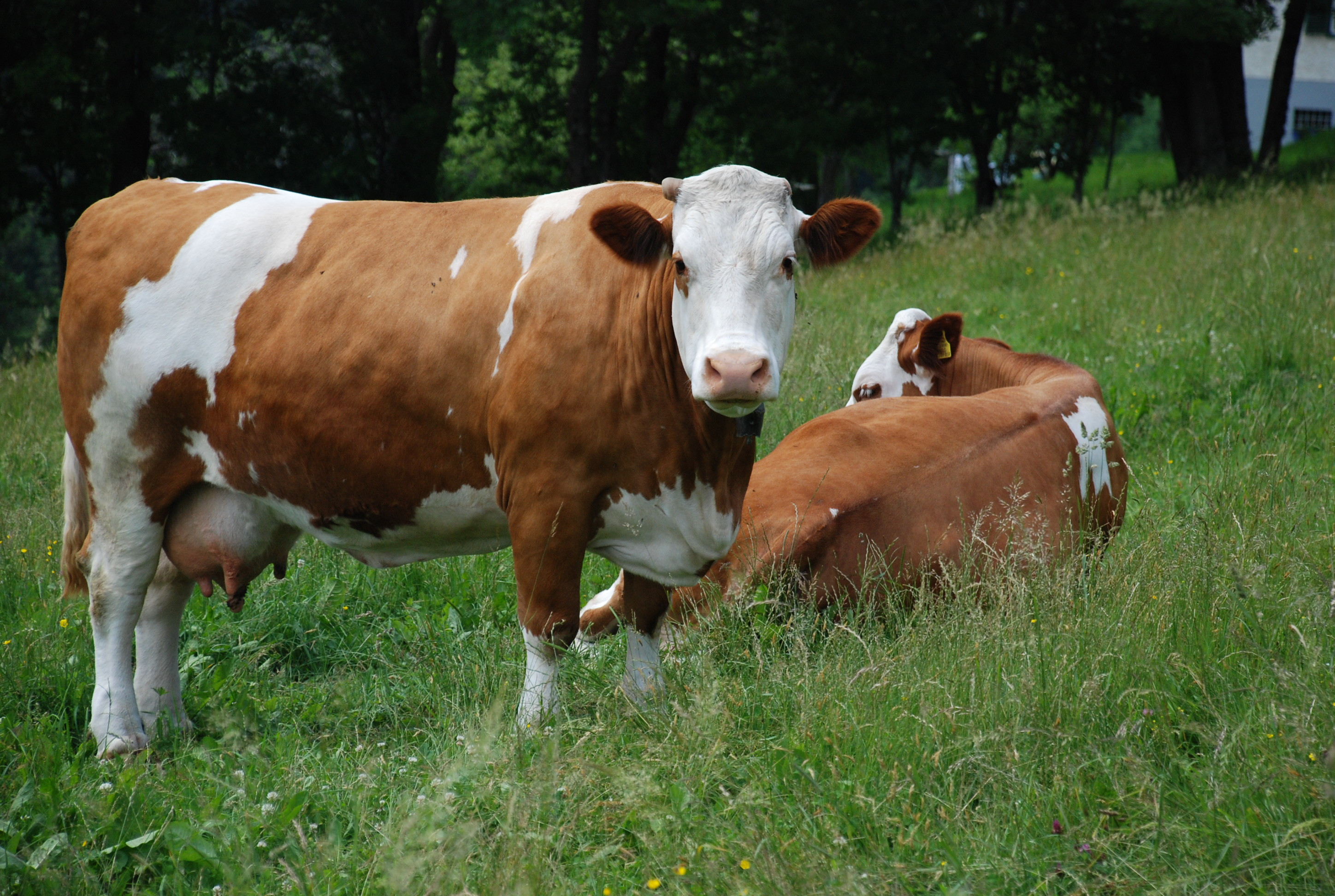 Fleckvieh (Scheck) auf der Weide in Rettenbach